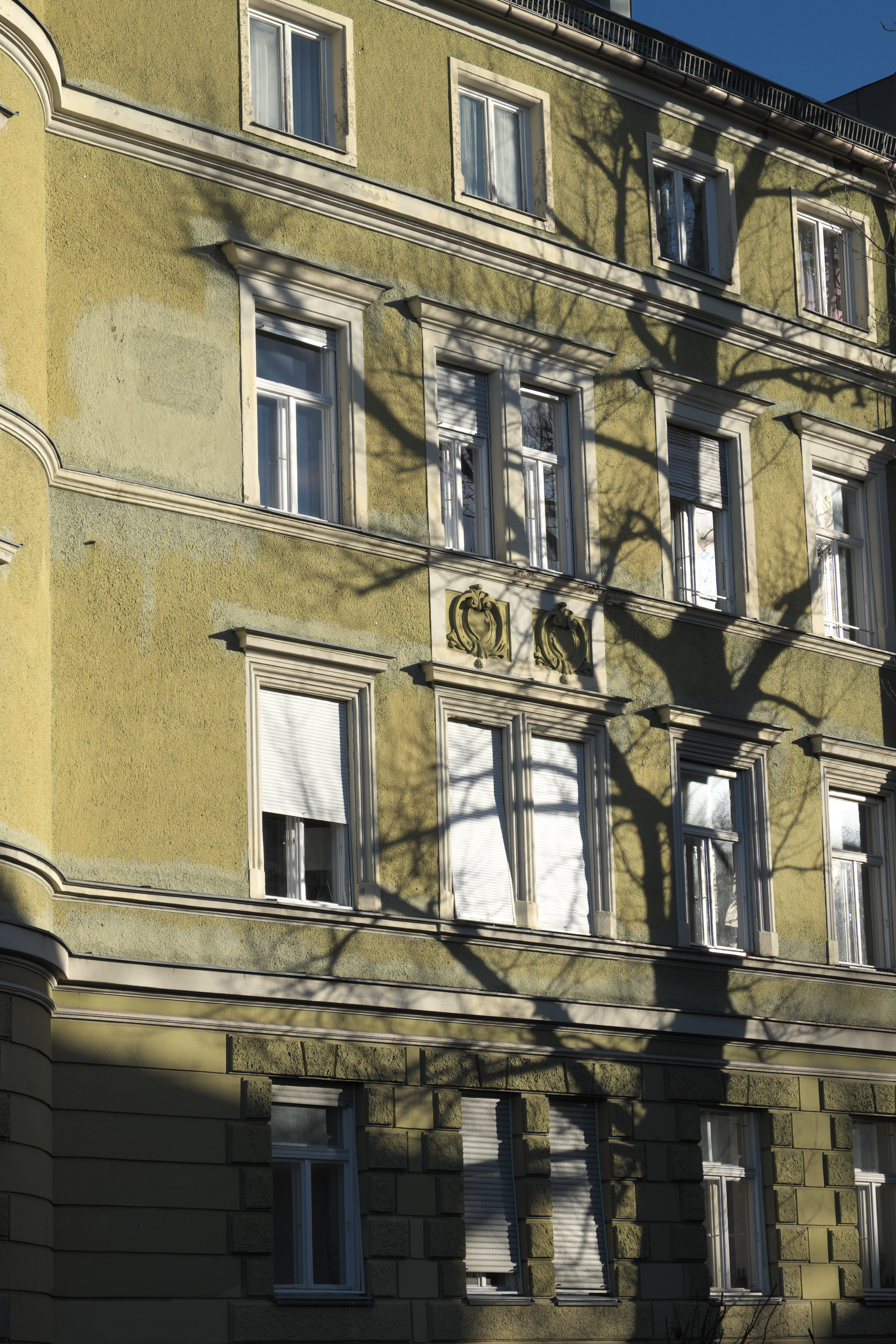 Mietshaus in der Mozartstraße 23 (München) in der Ludwigsvorstadt im Stadtbezirk Ludwigsvorstadt-Isarvorstadt in München (Bayern/Deutschland), 1896 von Hans Weber erbaut